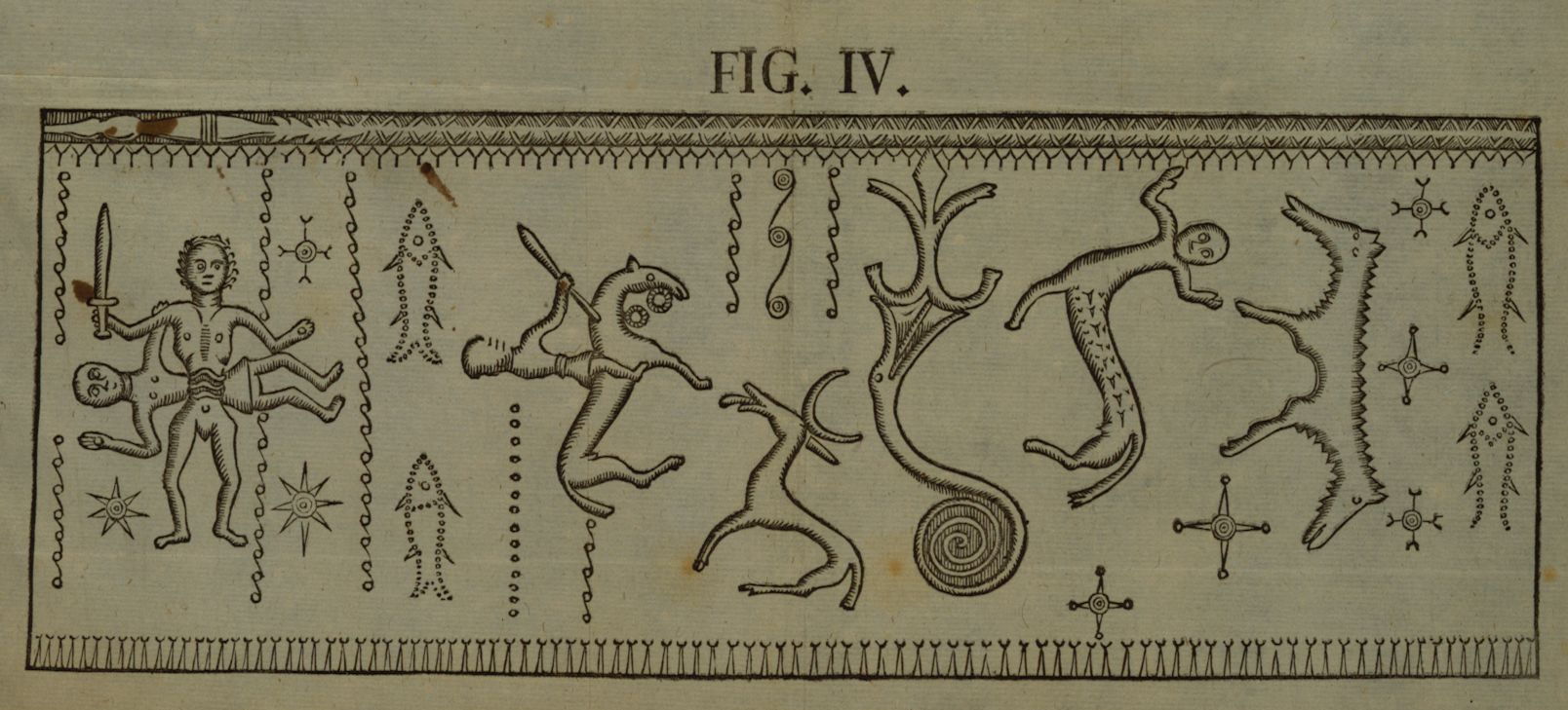 Affotografering af Paullis tegning af det korte horn (fig. IV).